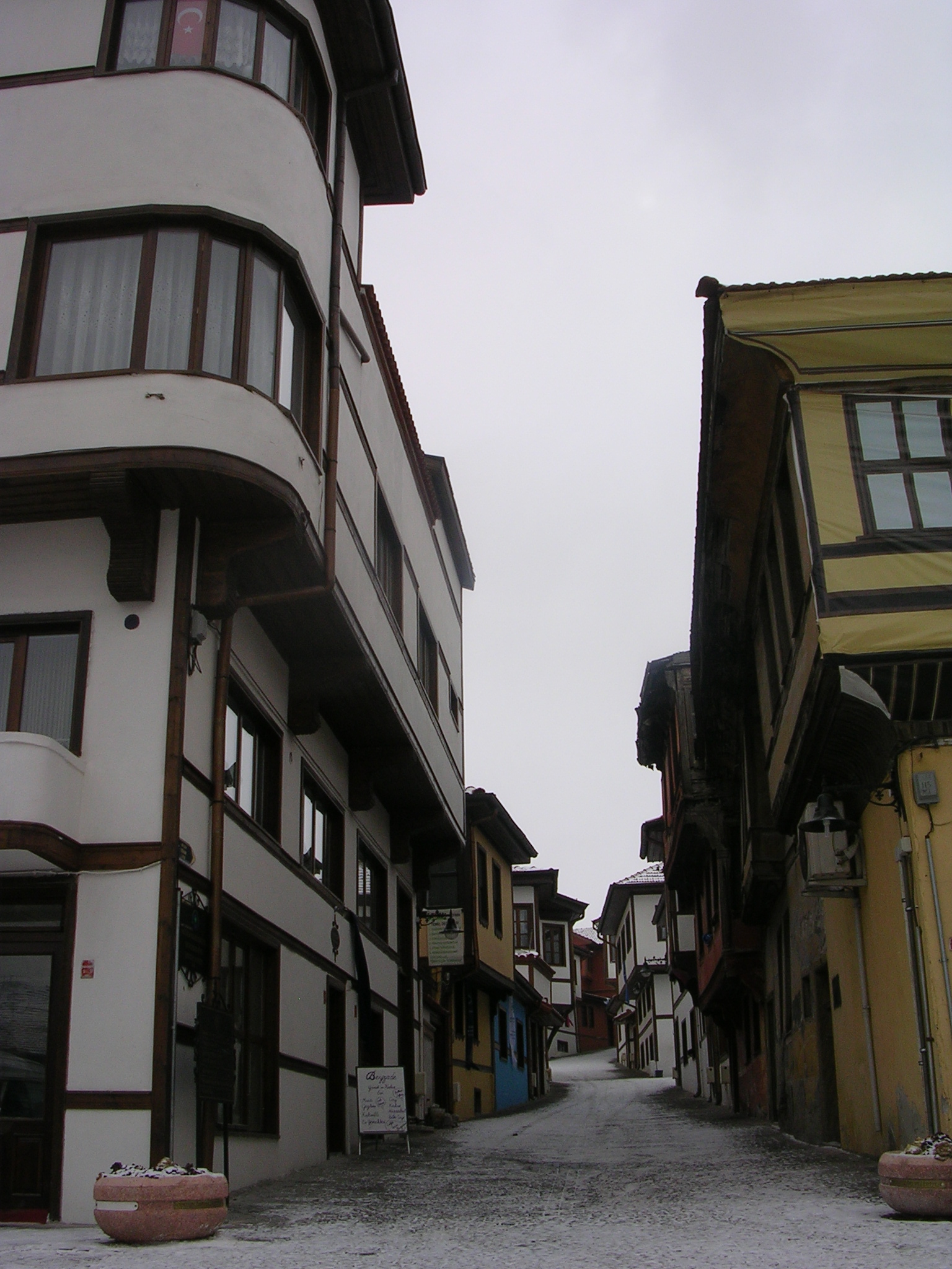 Eskişehir Odunpazarı Beyler sokağından bir görüntü